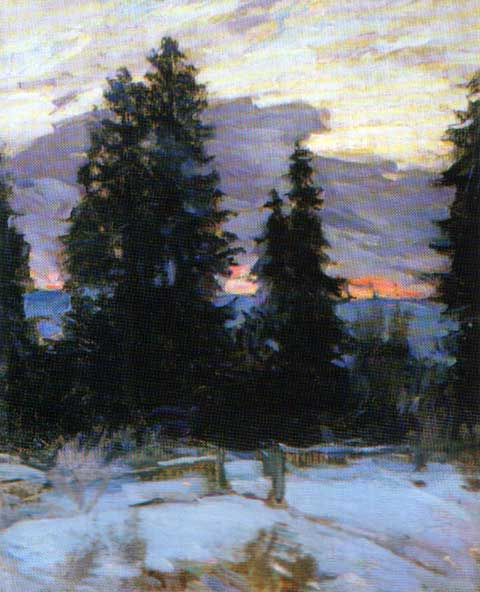 А.Е. Архипов "Зимнее утро", 1920. Холст, масло. 107х86 Коллекция Сочинского художественного музея